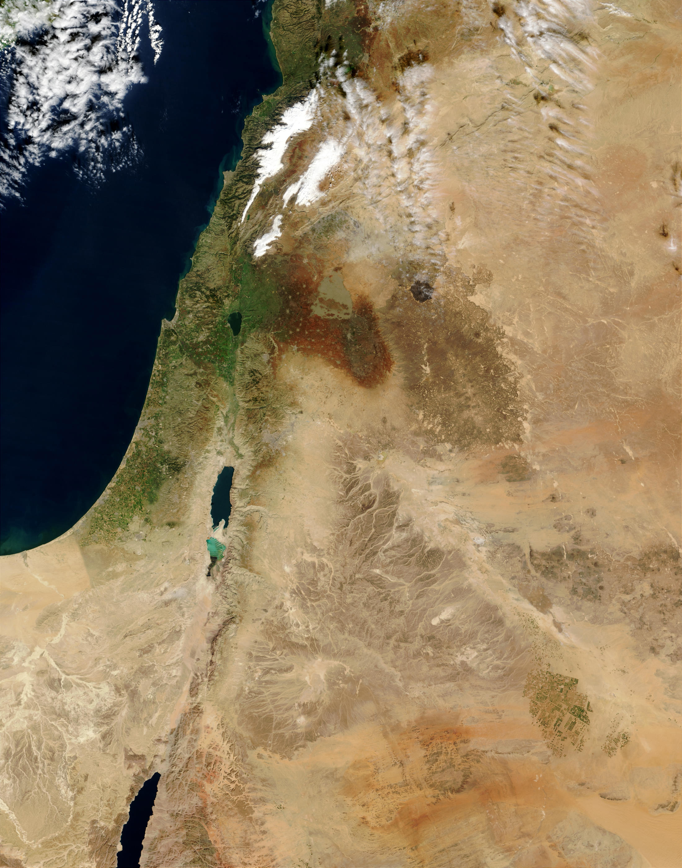 הורדת הגבולות מן התמונה: File:MiddleEast.A2003031.0820.250m.jpg